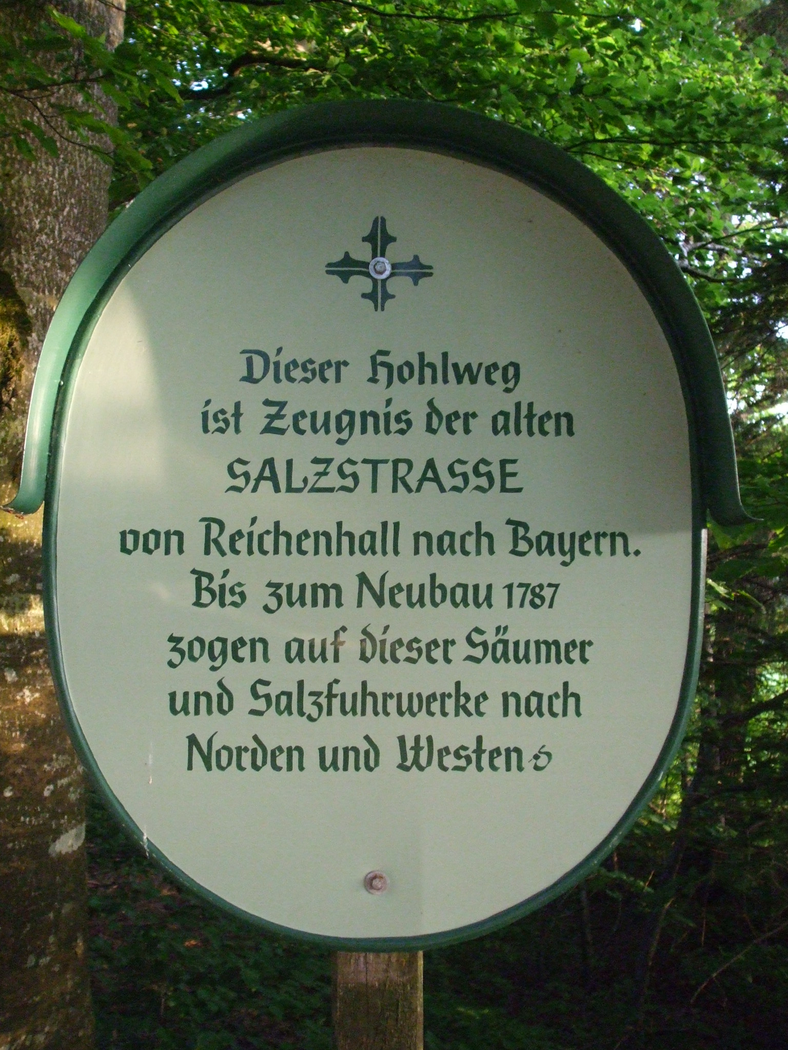 Beschilderung der historischen Salzstraße südlich von Teisendorf (Nähe Traunstein, Bayern)